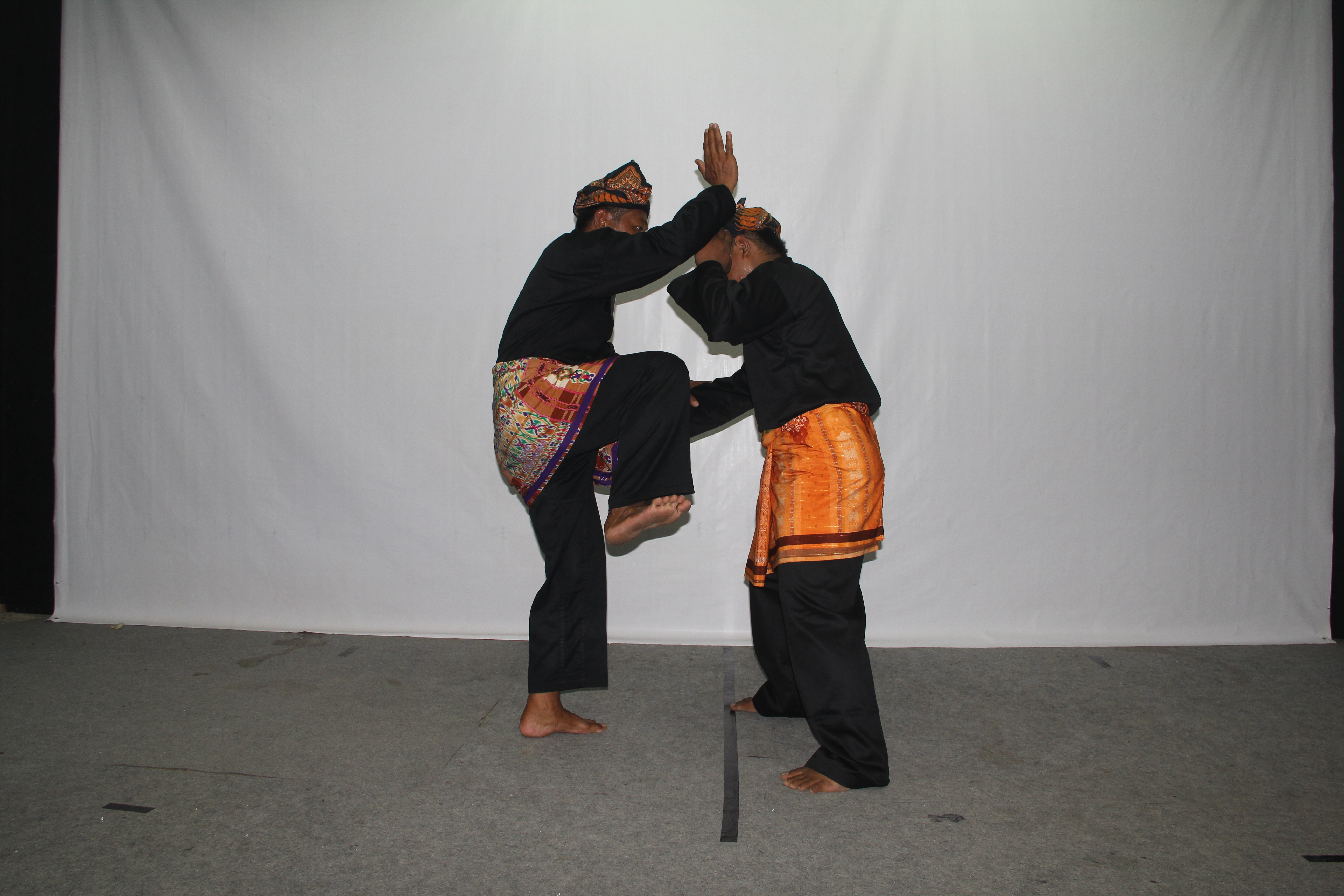 Totame maUitolo PopaI